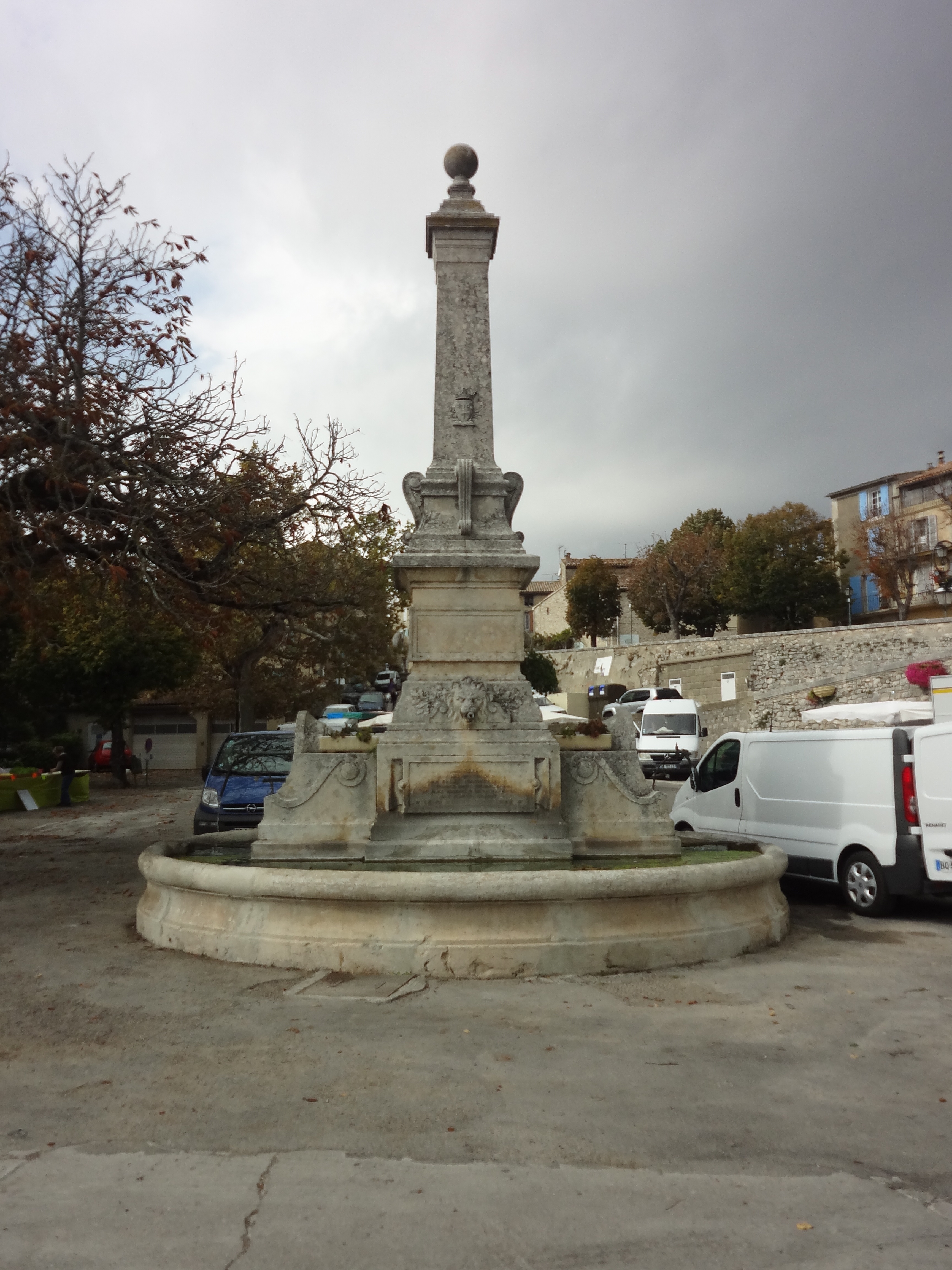 Fontaine monumentale de Reillanne